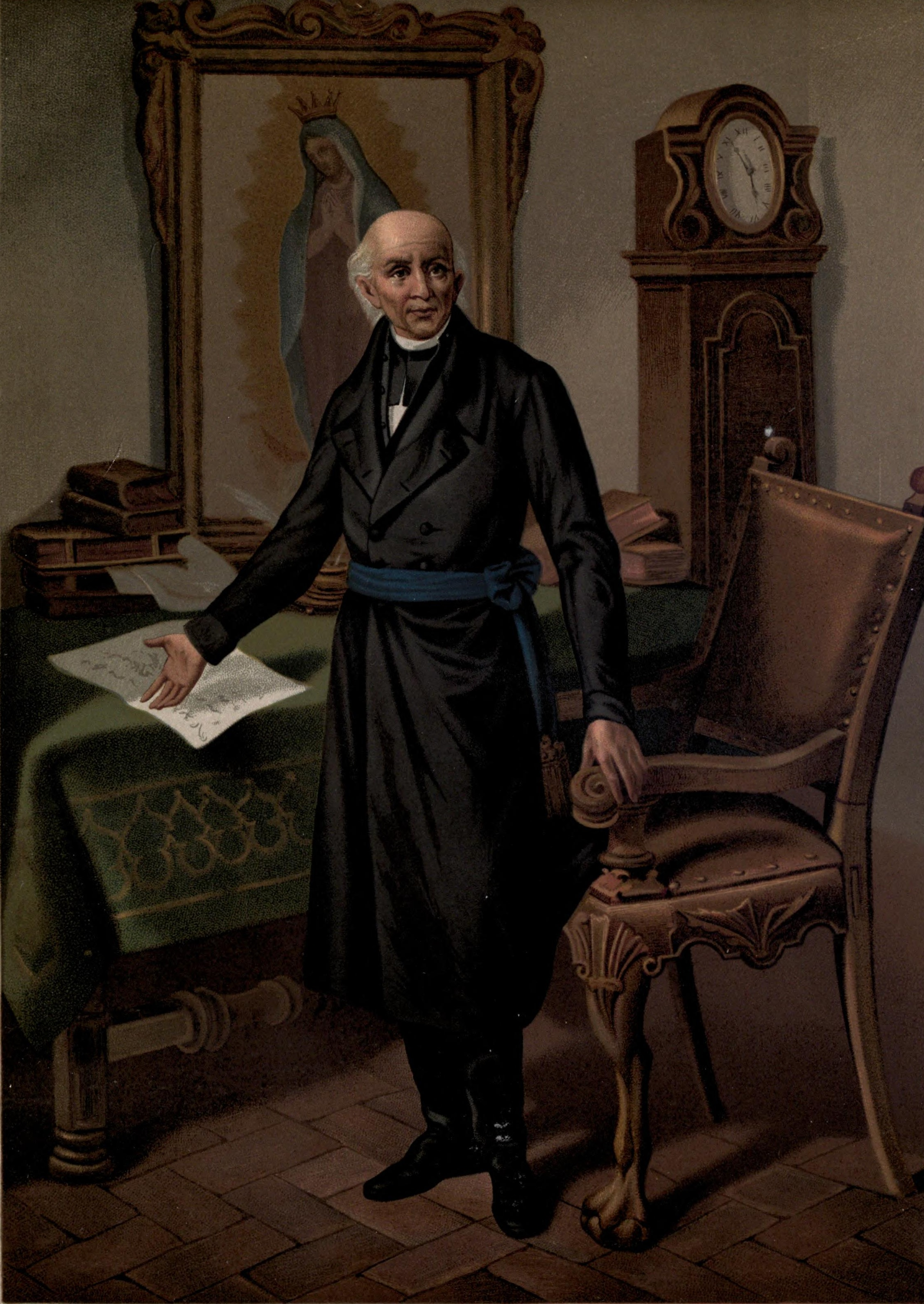 Imagen extraida del libro de Vicente Riva Palacio, Julio Zárate (1880) "México a través de los siglos" Tomo III: "La guerra de independencia" (1808 - 1821)